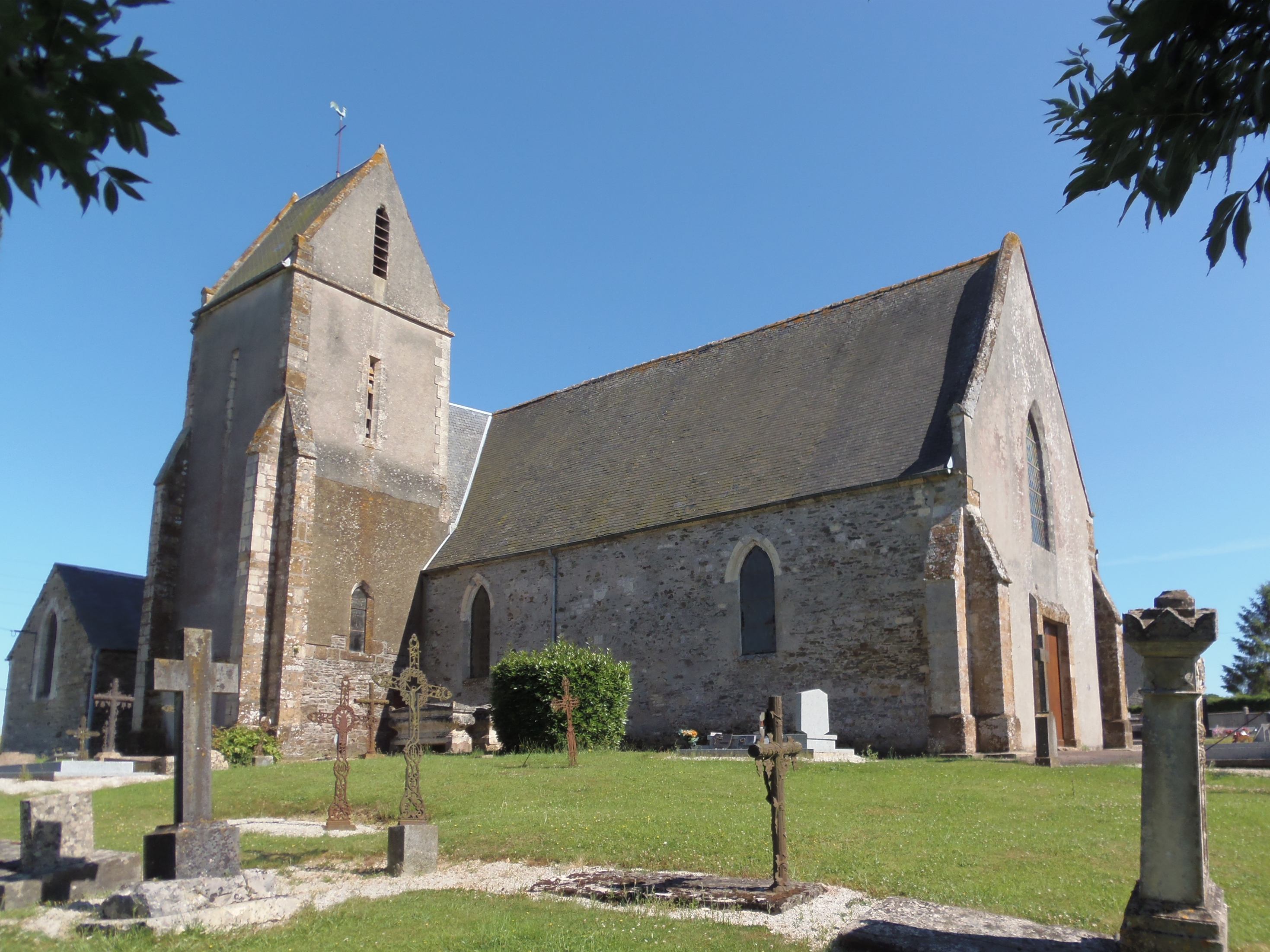 Courvaudon (Normandie, France). L'église Saint-Martin.